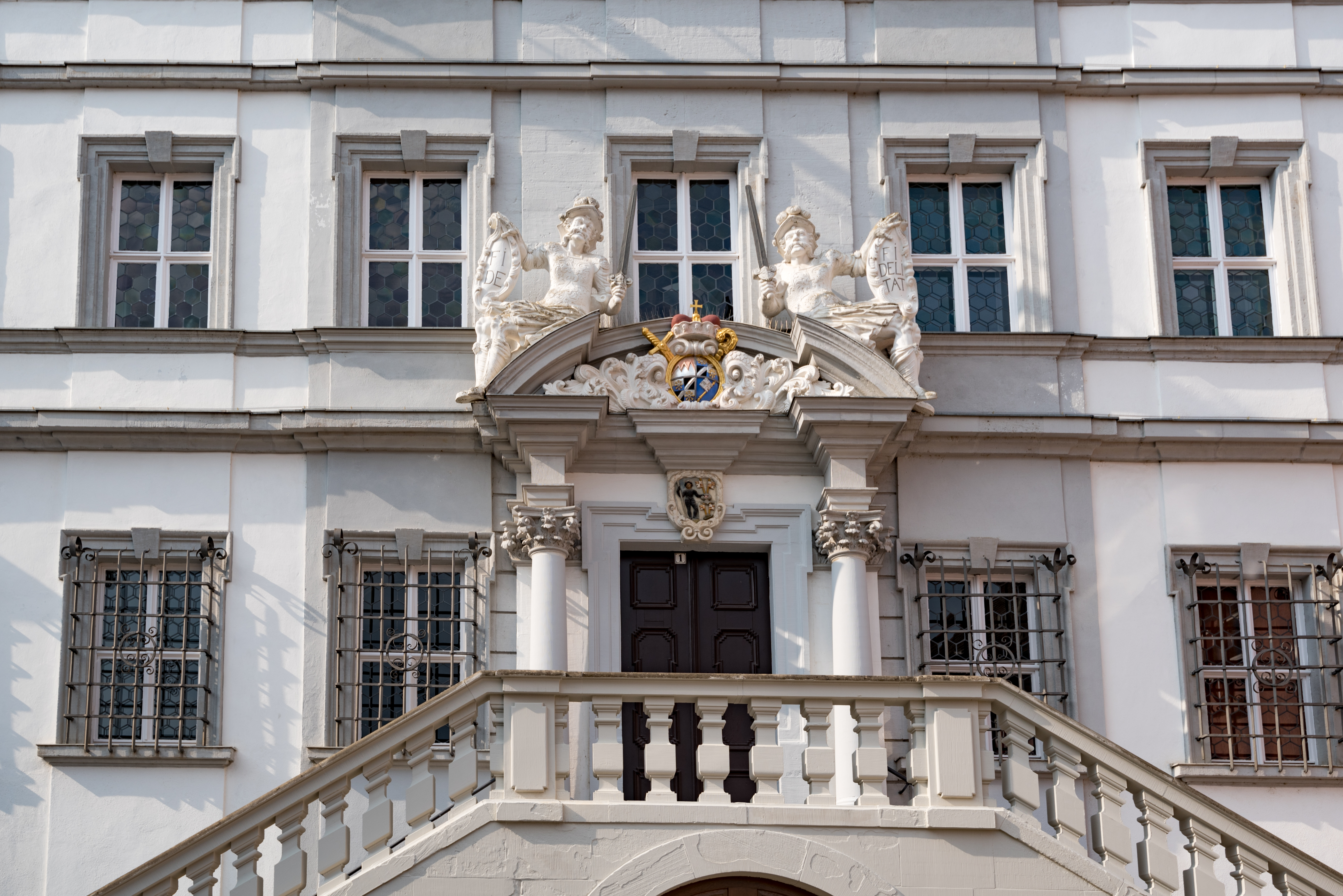 Iphofen, Marktplatz 1